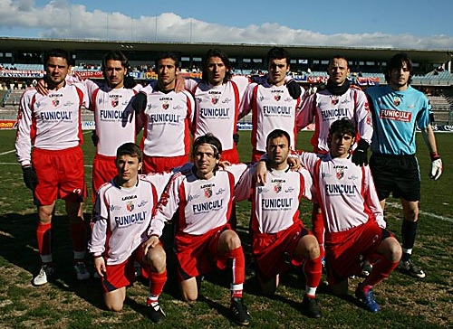 Associazione Sportiva Dilettantistica Caserta Calcio, 2007-08